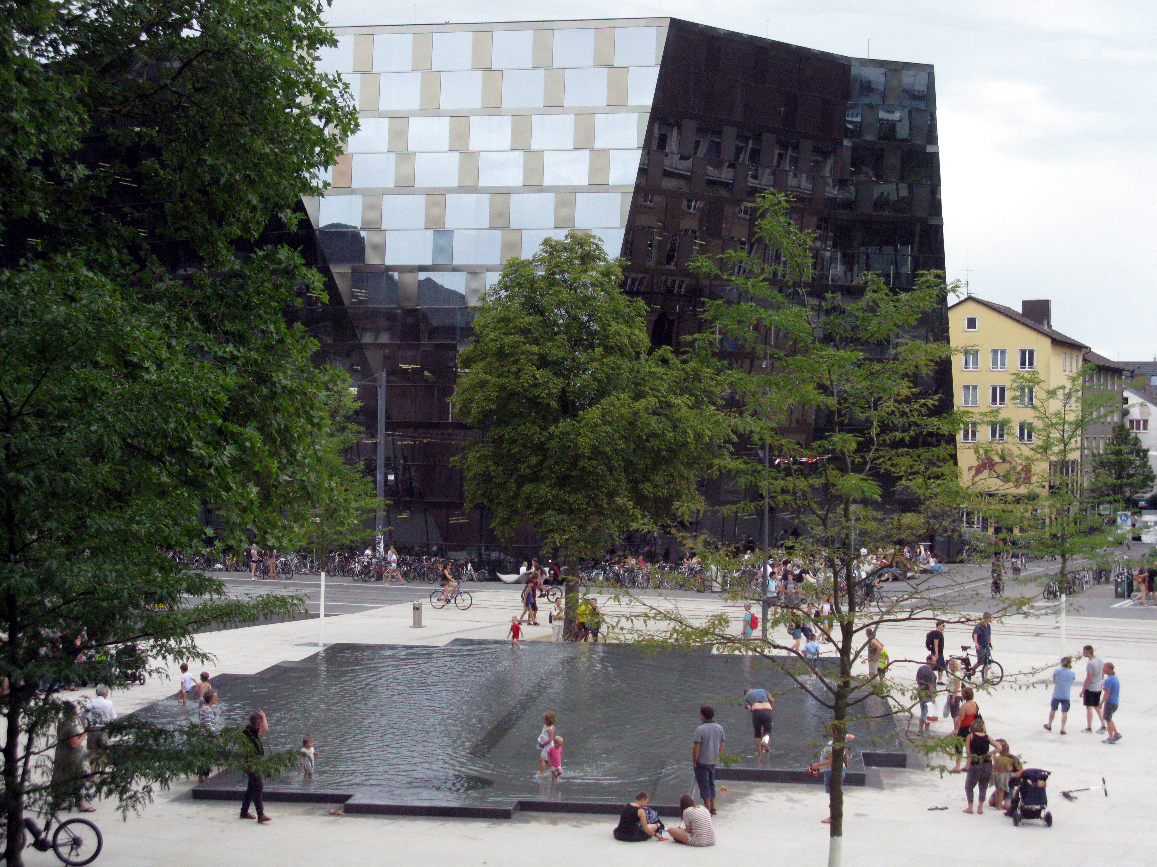 Platz der Alten Synagoge in Freiburg, Synagogenbrunnen mit der Universitätsbibliothek, Blick vom Kollegiengebäude II der Universität